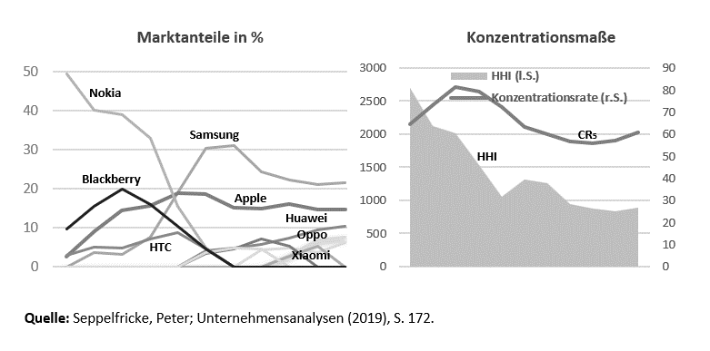 Es werden die verschiedenen Konzentrationsmaße im Markt für Smartphones angewendet. Die Abbildung habe ich persönlich mit Powerpoint angefertigt. Es besteht kein Urheberstreit.